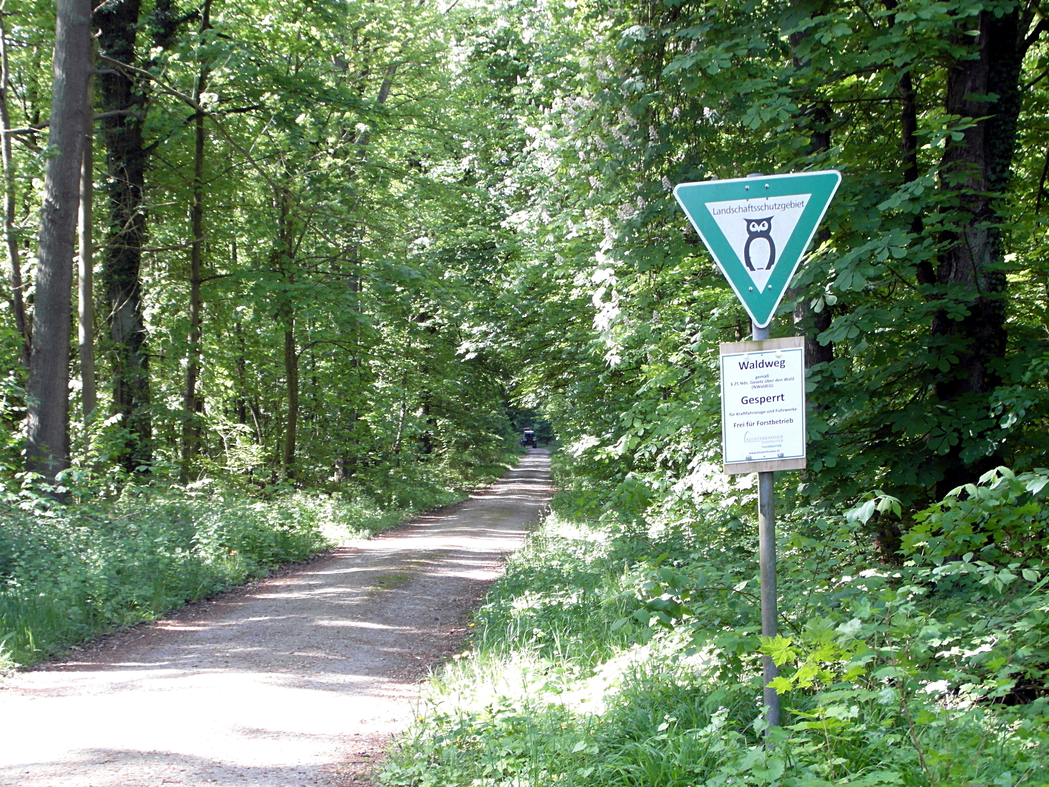 Landschaftsschutzgebiet LSG H 23 Norddeister: Beginn der Münder Heerstraße beim Wennigser Ortsteil Waldkater.